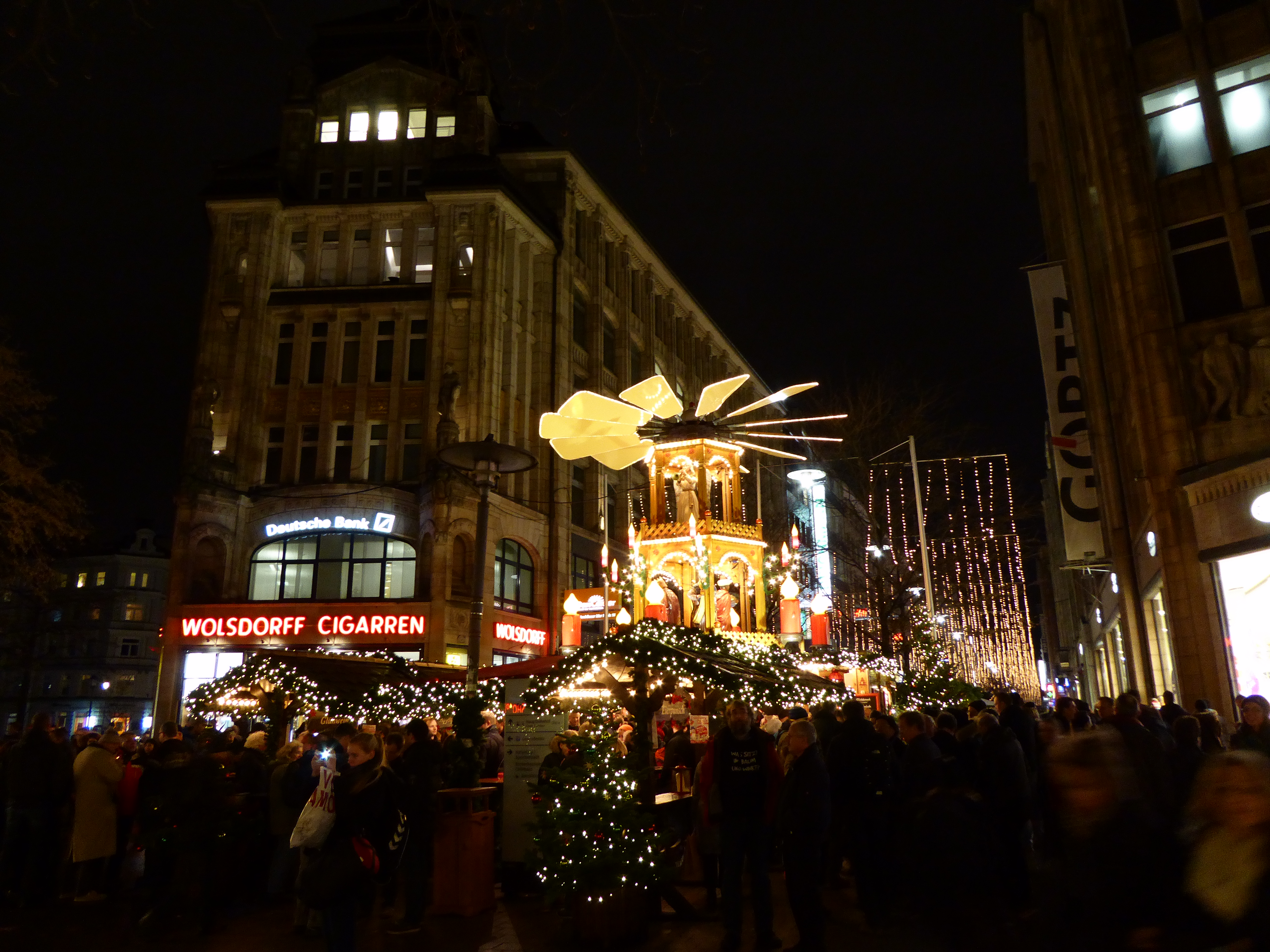 Impressionen vom Weihnachtsmarkt in der Spitalerstraße in Hamburg (2014)